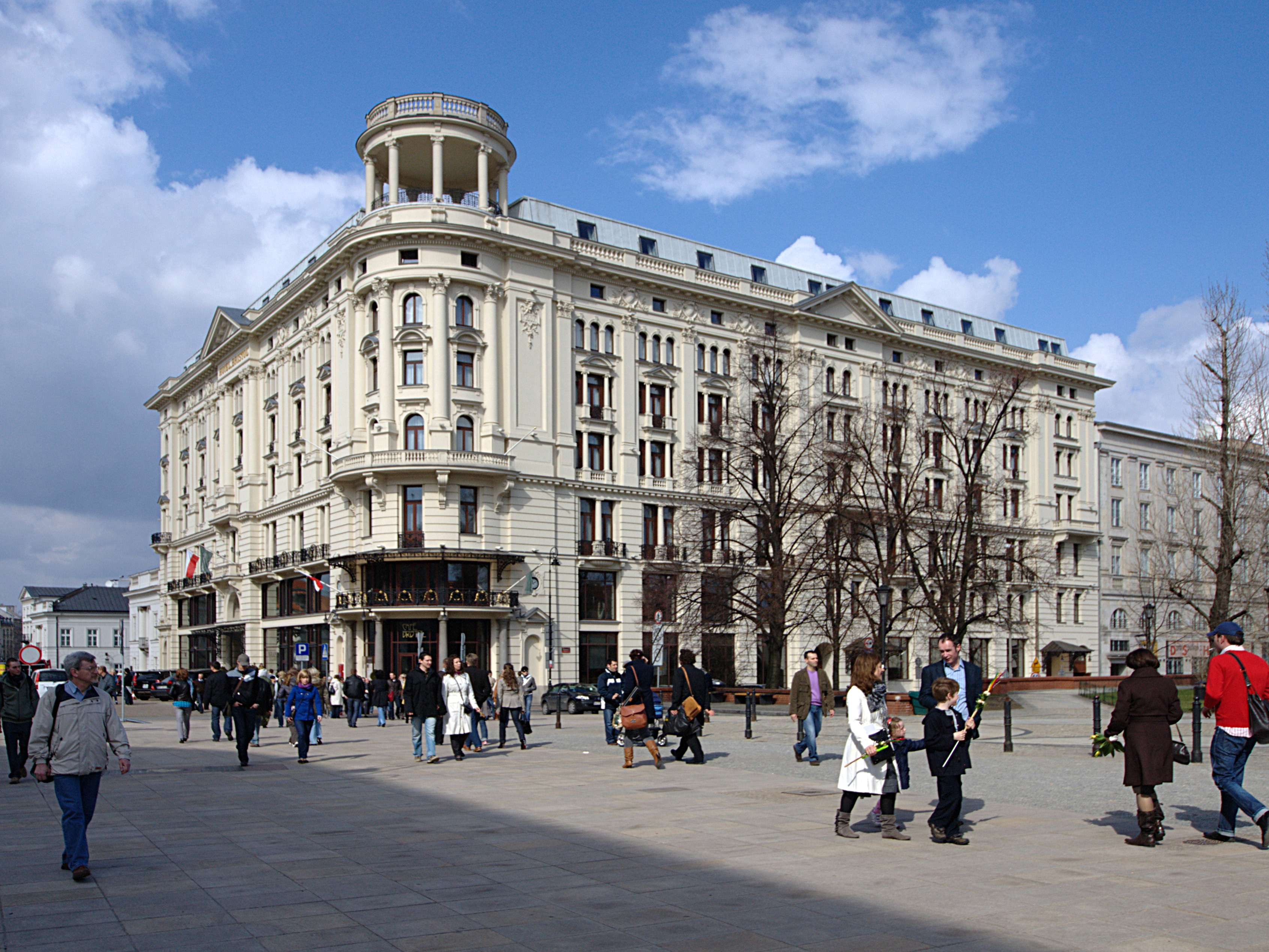 Hotel Bristol.